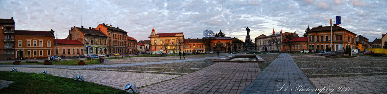 Monumentul celor 13 generali, executați în anul 1849, Parcul Reconcilierii, Arad, jud Arad, cod LMI AR-III-m-B-00663